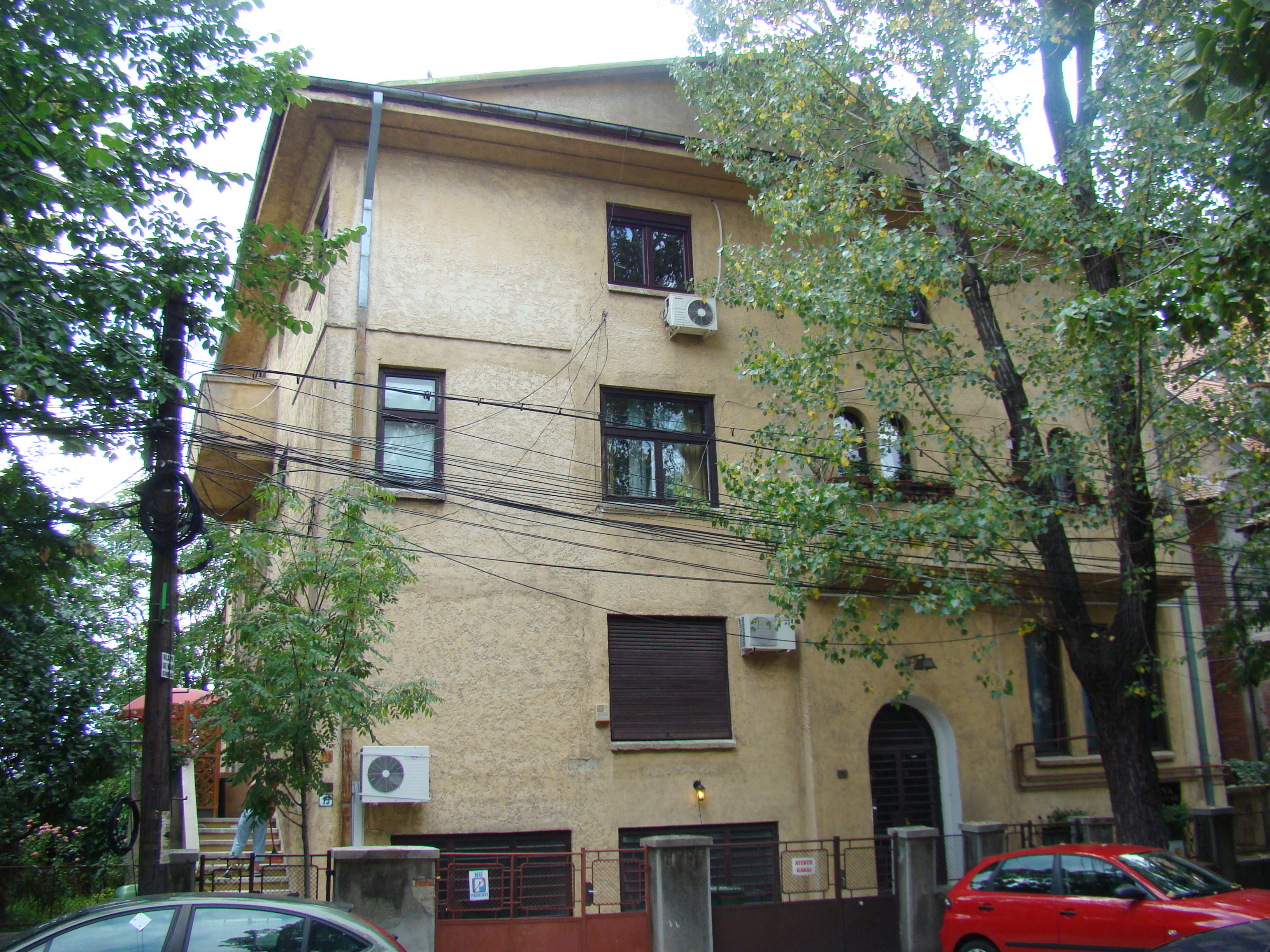 Casă monument istoric, str.Londra, nr. 15